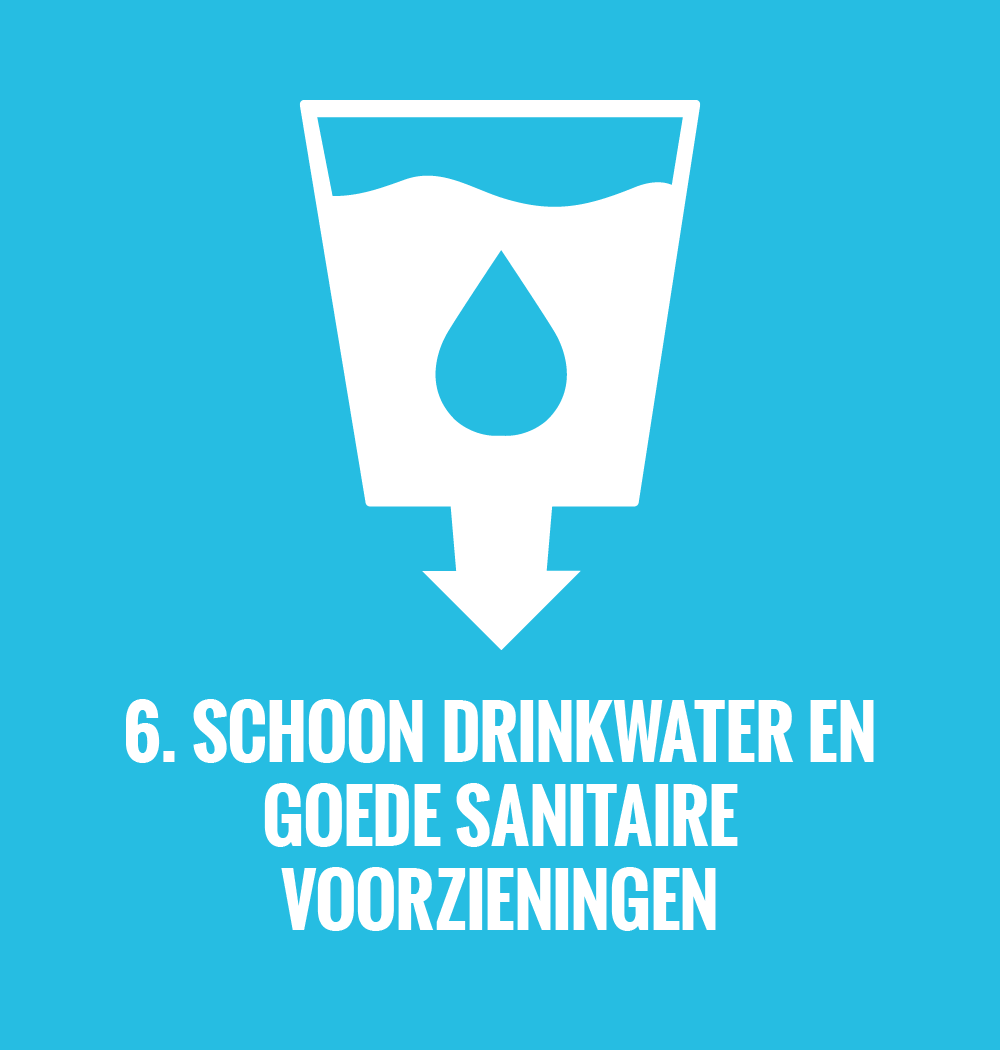 Duurzame ontwikkelingsdoel SDGRomână: Obiectivul de dezvoltare durabilă nr. 6: Apă curată și canalizare (în neerlandeză)